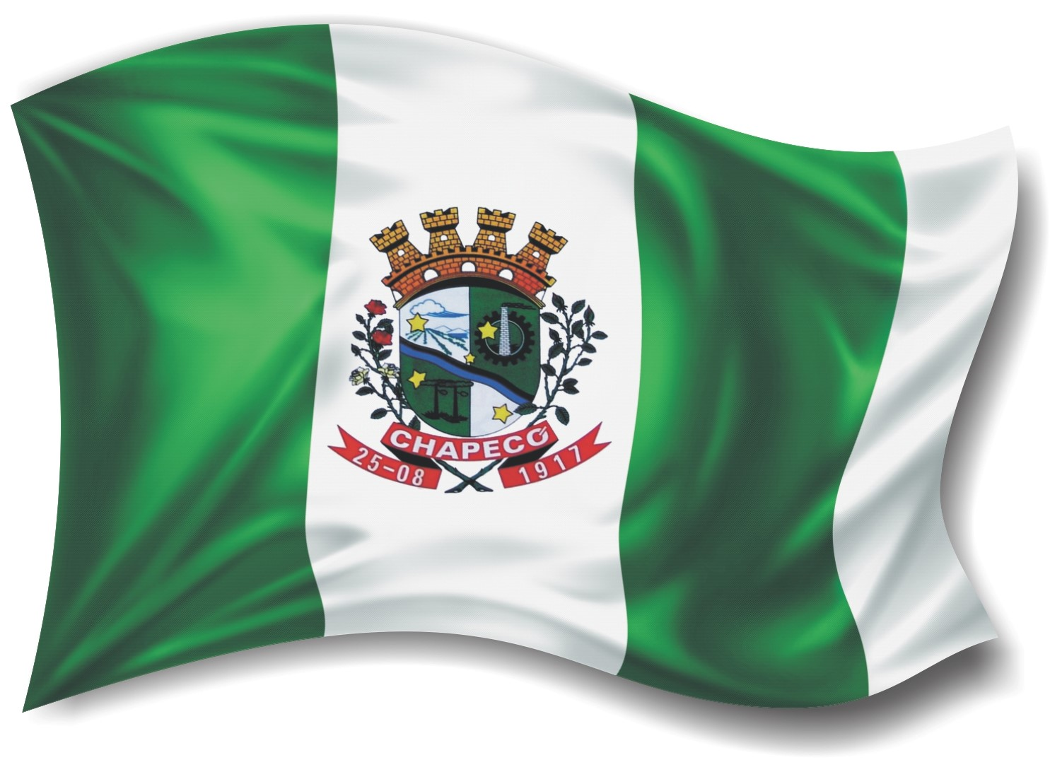 Bandeira oficial de Chapecó - SC